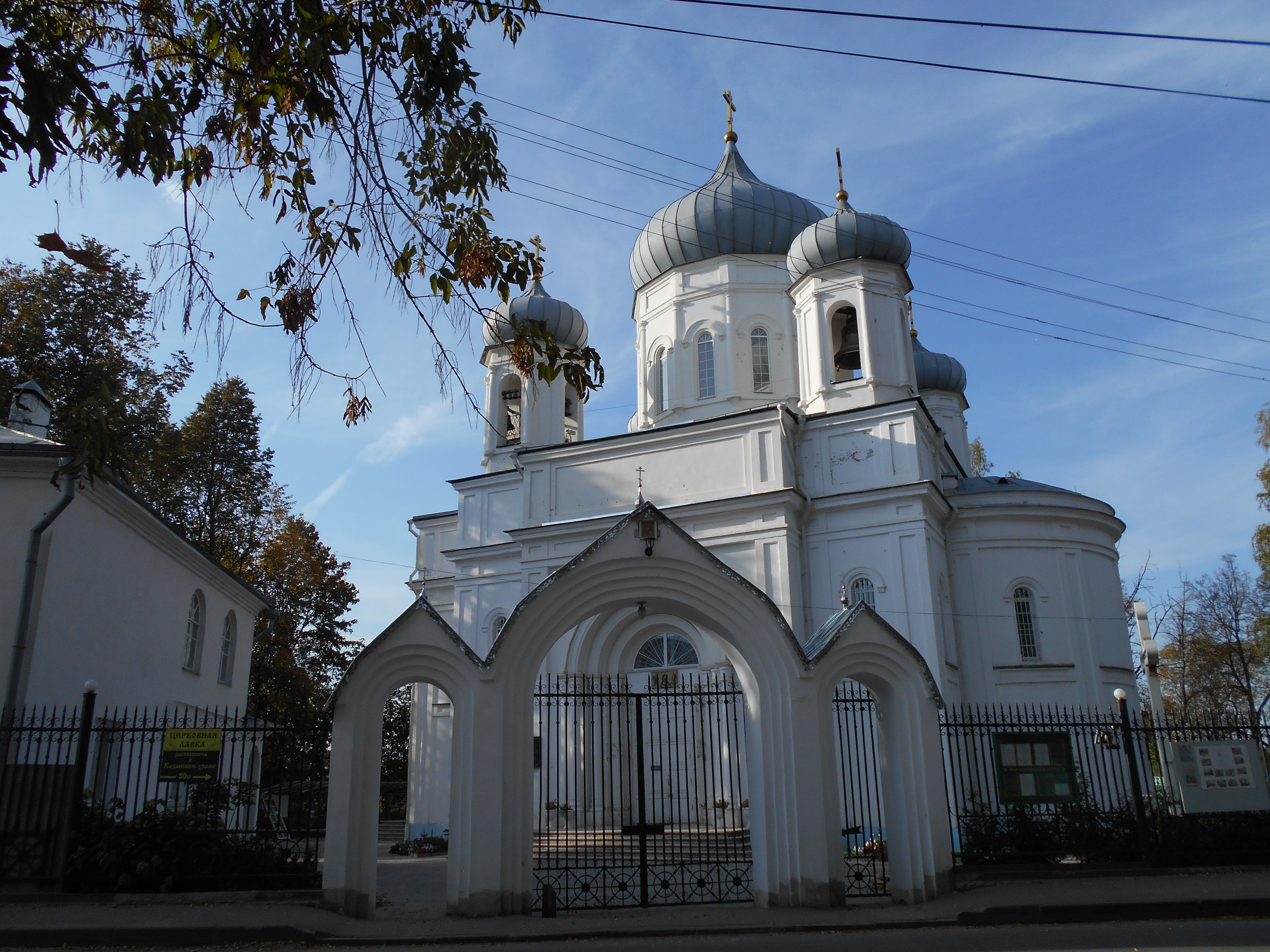 Церковь Вознесенская: Торопецкий тракт, кладбище Казанское, Ржев, Ржевский район, Тверская область